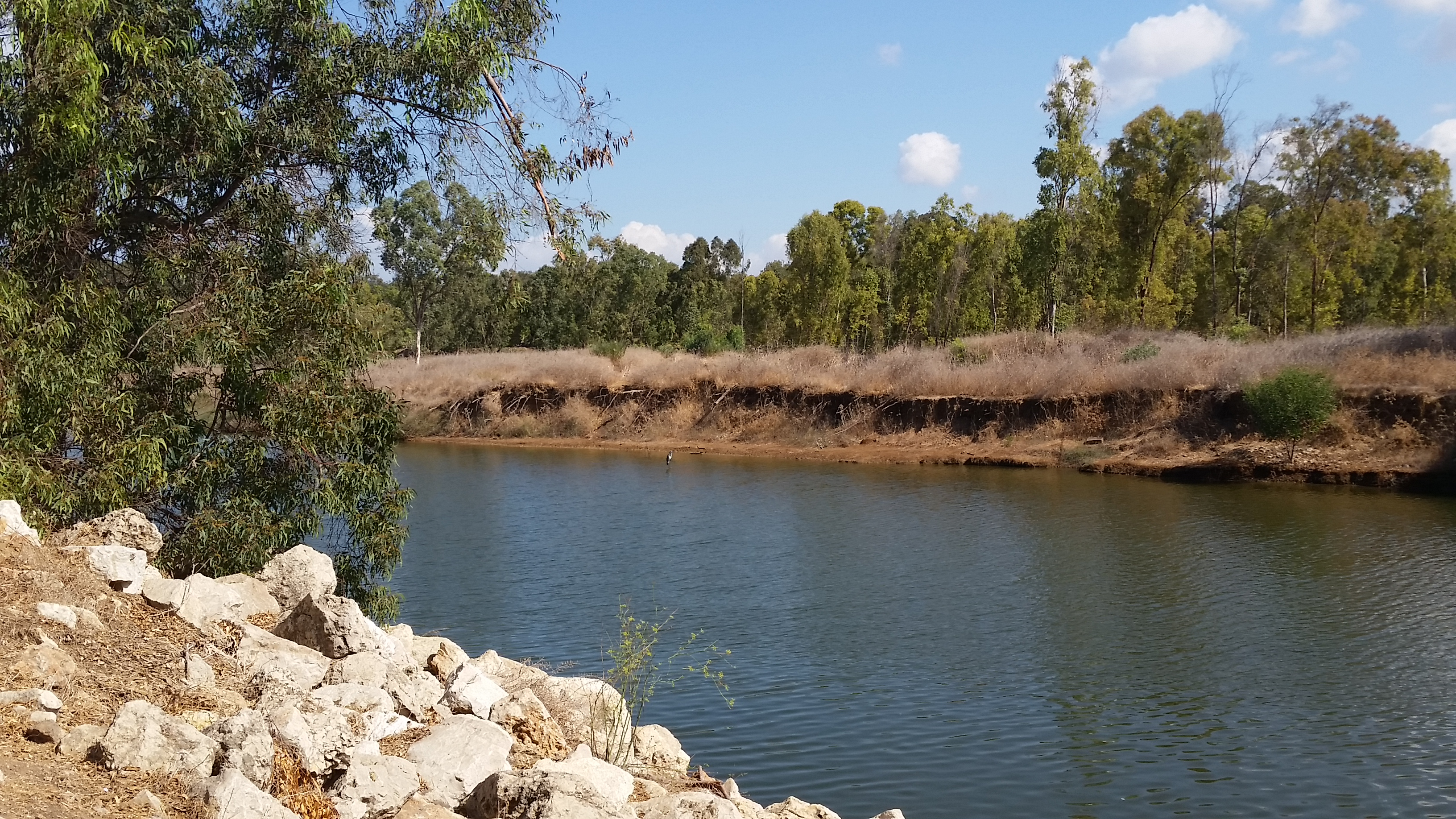 Nahal Rubin